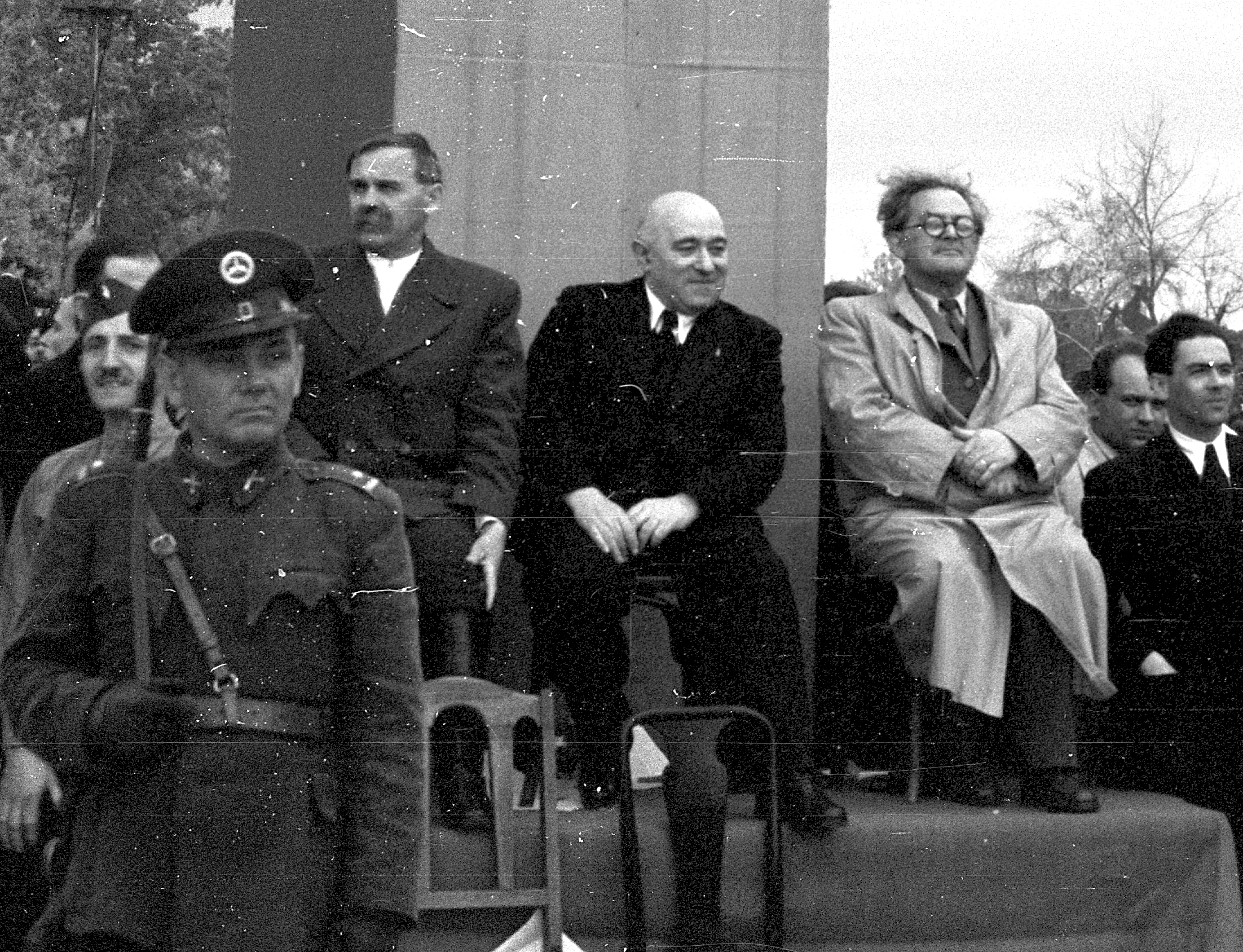 Hősök tere, május 1-i ünnepség. Az emelvényen Veres Péter, Rákosi Mátyás, Szakasits Árpád. Location: Hungary, Budapest XIV. Tags: Budapest Title: Hősök tere, május 1-i ünnepség. Az emelvényen Veres Péter, Rákosi Mátyás, Szakasits Árpád.